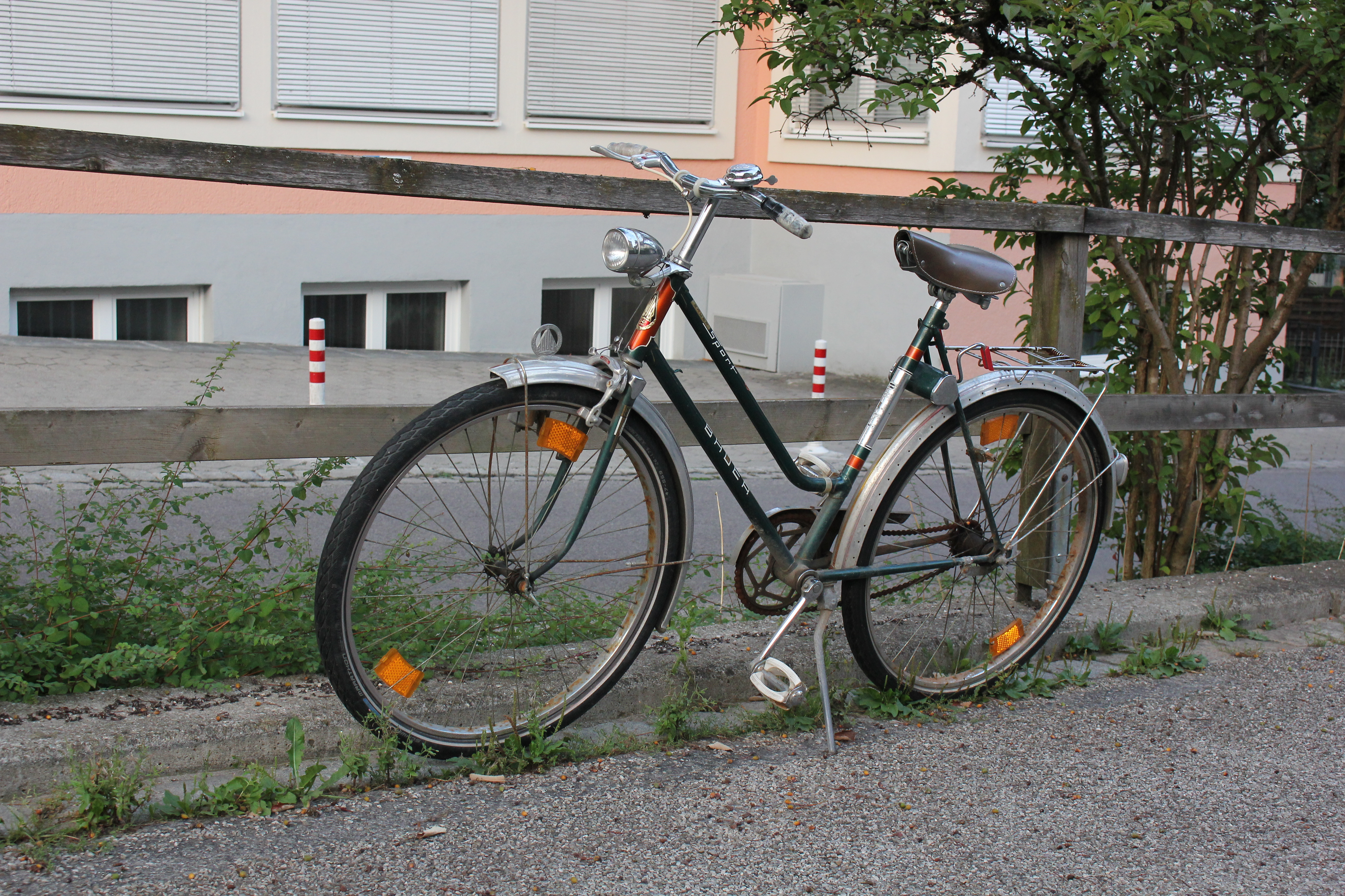 Bauer-Fahrrad, Modell „Sport“, aus der Zeit 1961 bis 1968